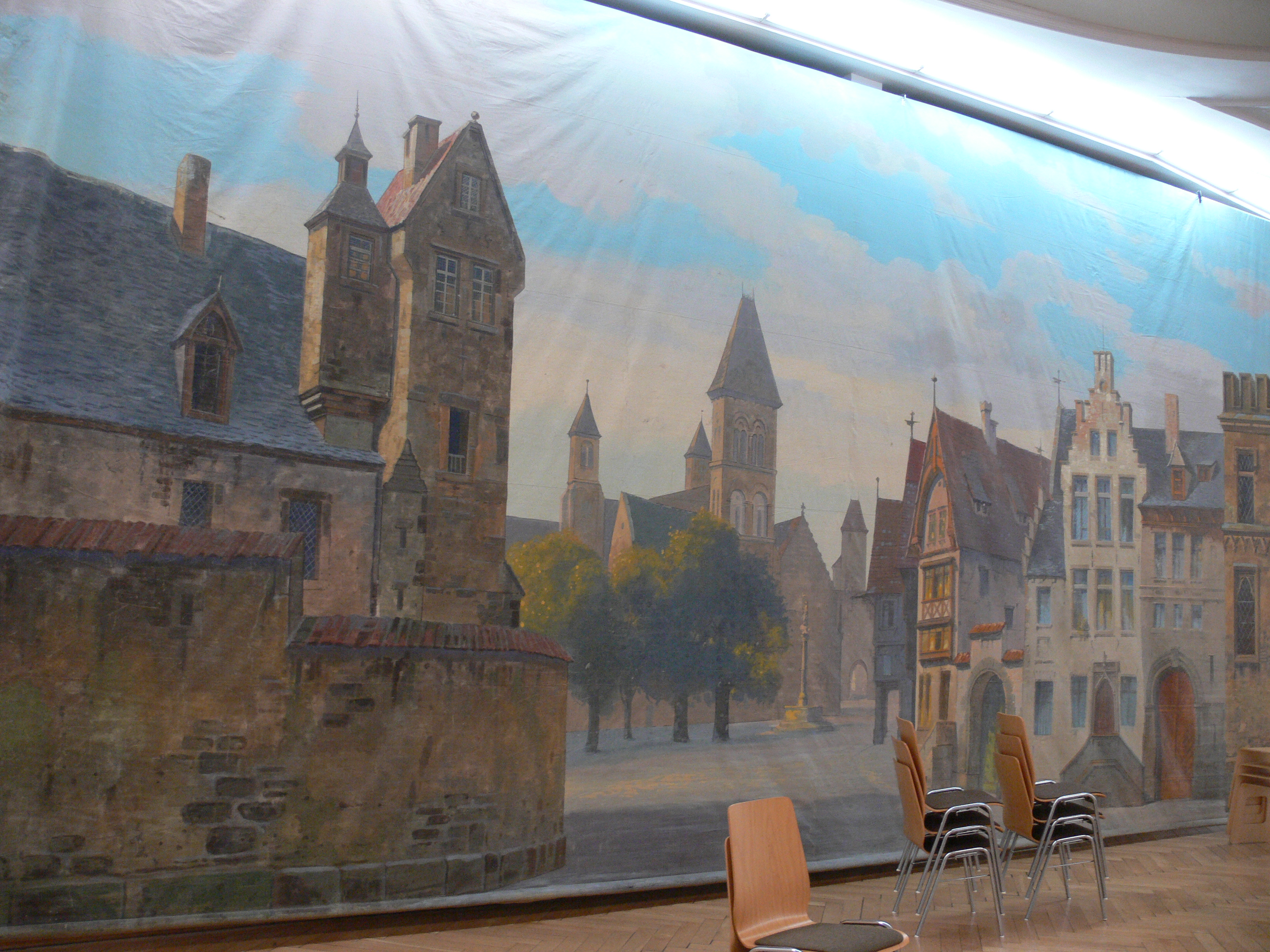 Einer von zahlreichen erhaltenen Bühnenprospekten des Konzerthauses Ravensburg aus der Erbauungszeit um 1900, ausgestellt im Rahmen der Karl-Erb-Ausstellung im Alten Theater in Ravensburg, August 2008 „Mittelalterliche Stadt“; ca. 10 m x 5 m